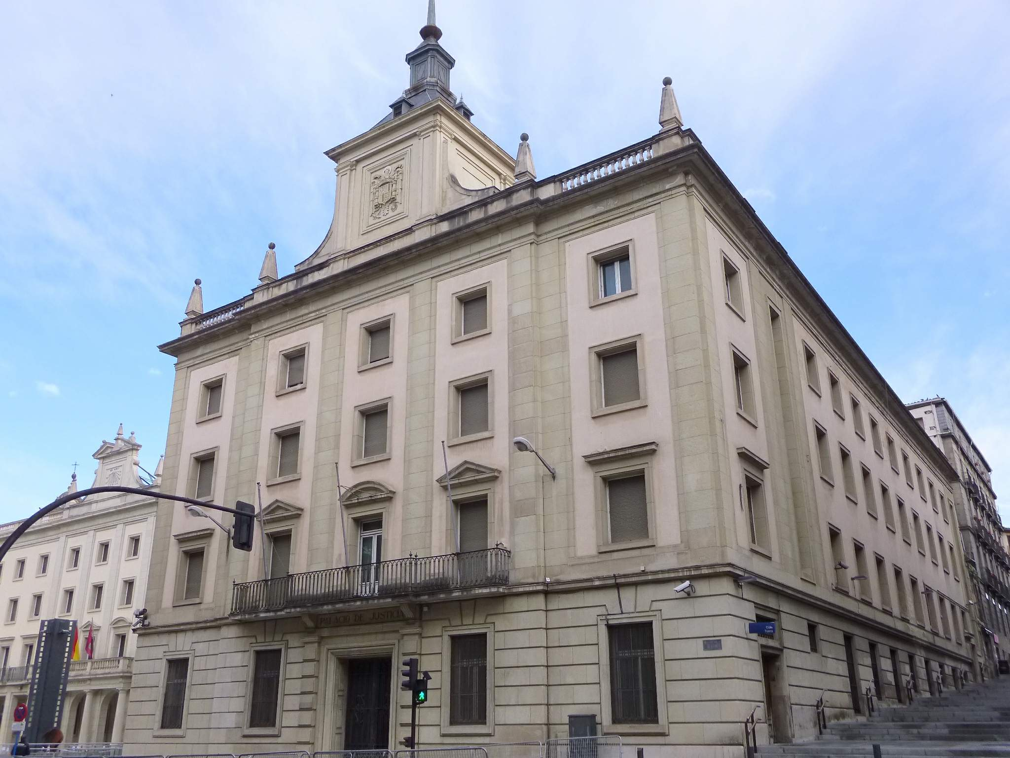 Antiguos Juzgados de Vitoria